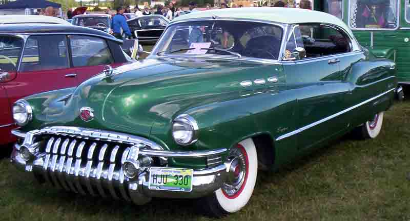 1950 Buick Super Riviera Series 50 Model 56R 2-door Hardtop